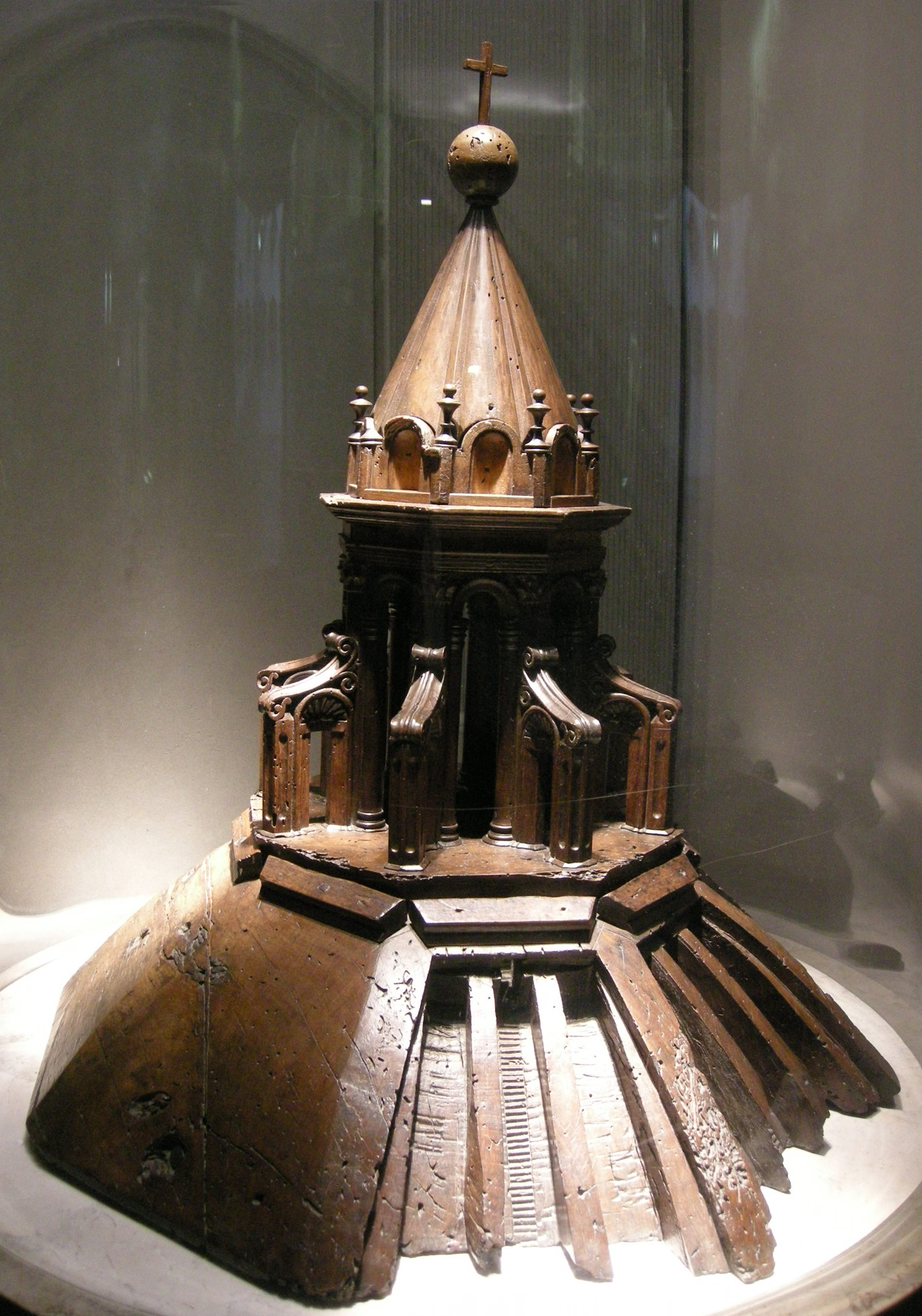 Progetto ligneo per la lanterna, 1673